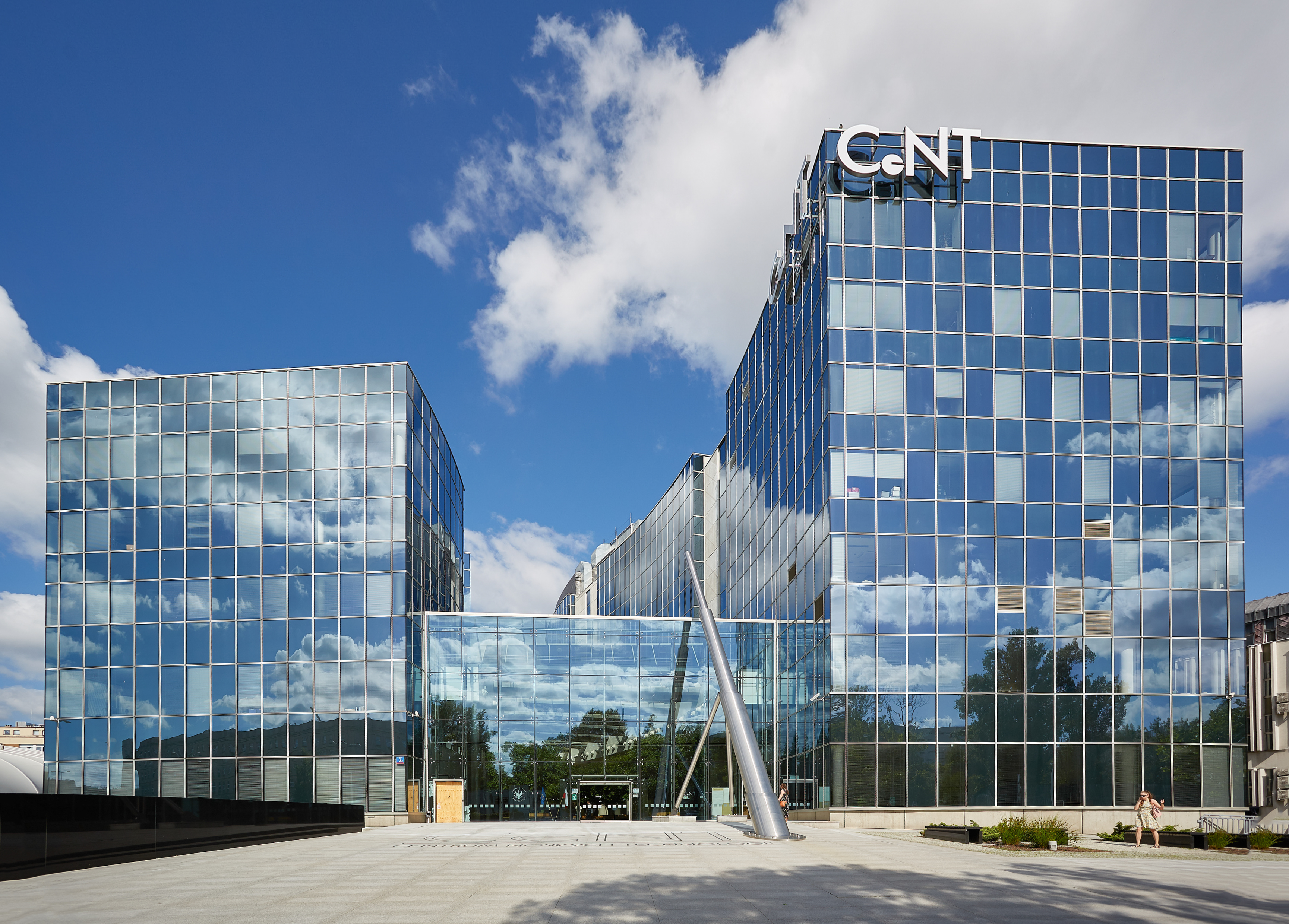 Siedziba Szkoły Edukacji w budynku CeNT na Kampusie Ochota UW